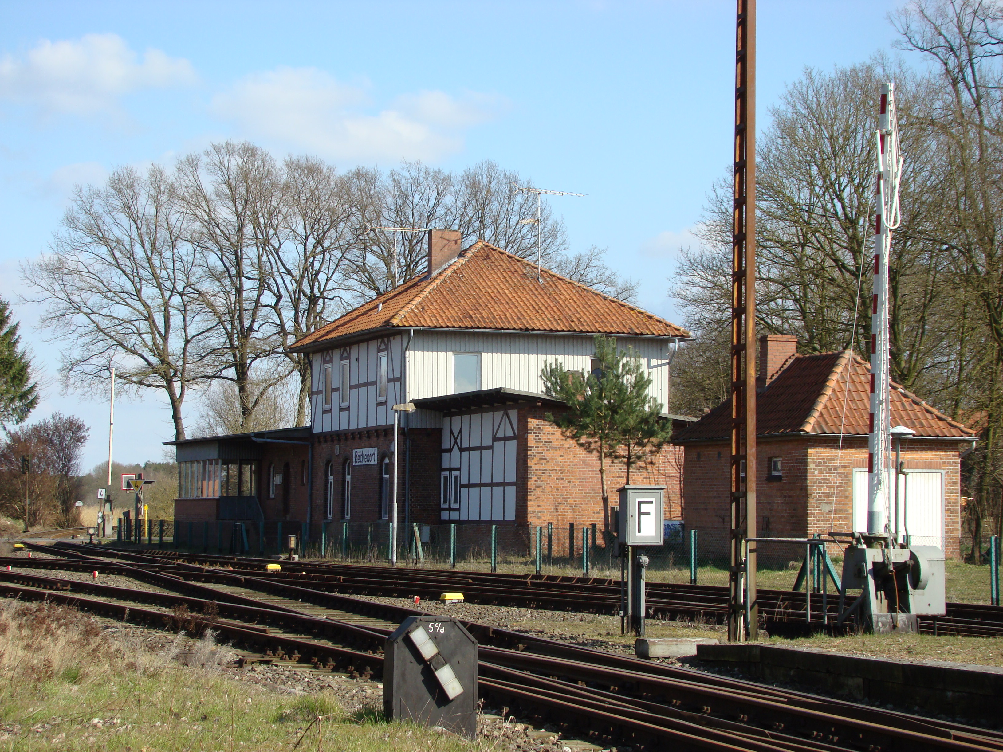 Bahnhof in Beckedorf (Landkreis Celle)